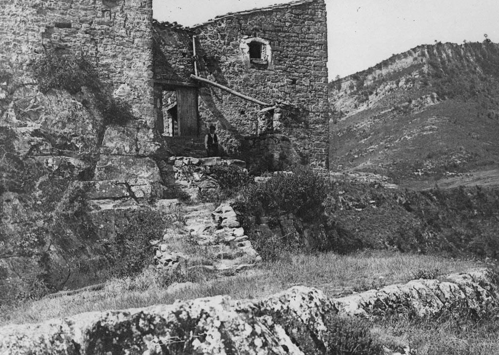 Entrada de Castell amb un home. Cèsar August Torras i Ferreri (Entre 1890 i 1923)